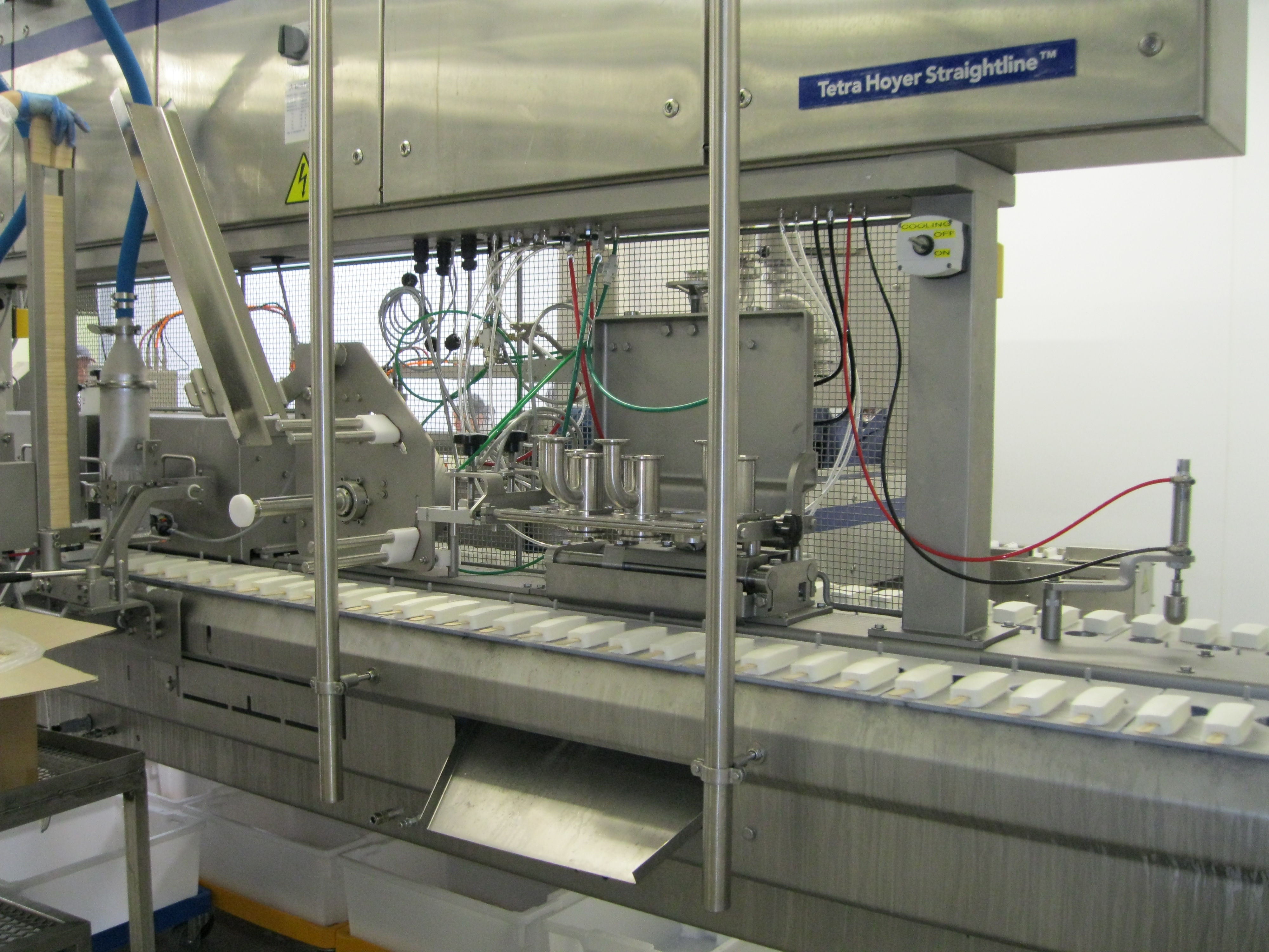 Balbiino pulgajäätise liin